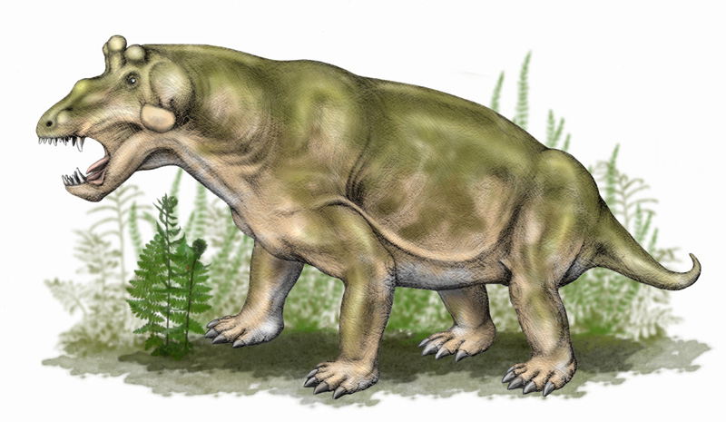 Estemmenosuchus uralensis, a russian dinocephalian